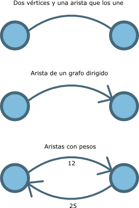 Imagen que muestra representaciones de los distintos tipos de aristas Ejemplo de arista, arista en un grafo dirigido y aristas con pesos.